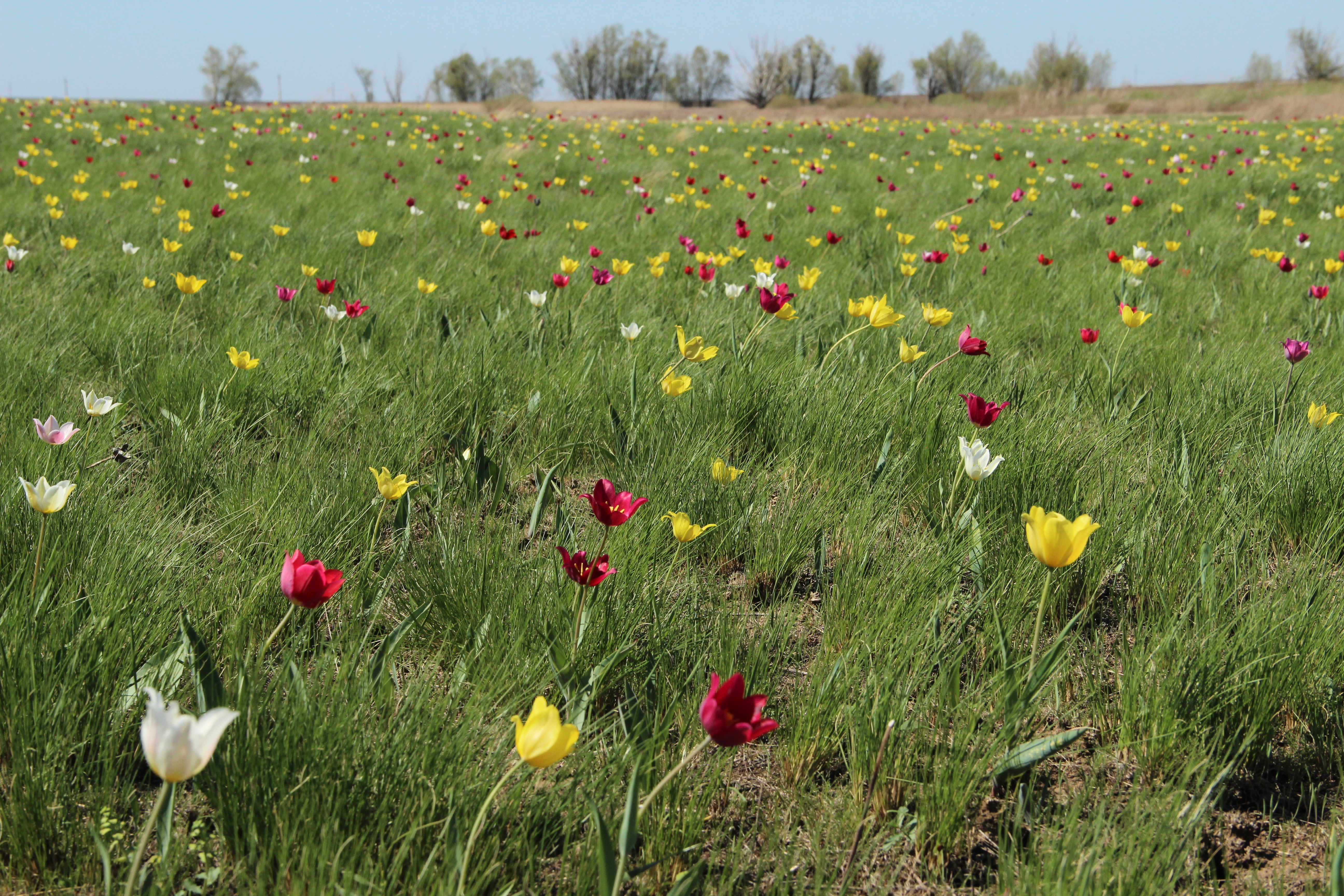 Тюльпанная степь: Новоузенский район,, Саратовская область This image is related to the protected area of Russia number 6410004